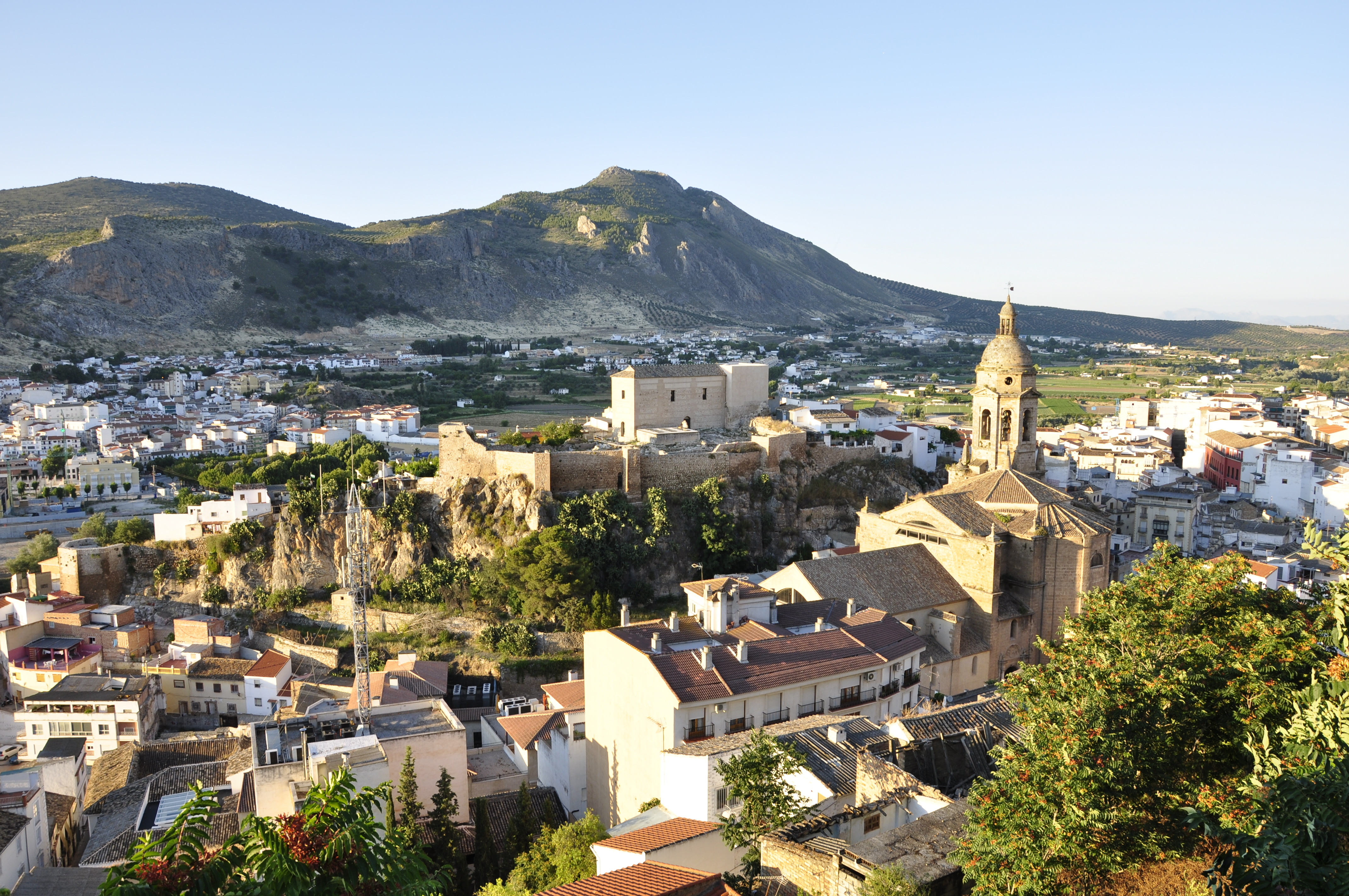 Vista general del casco antiguo y murallas de Loja